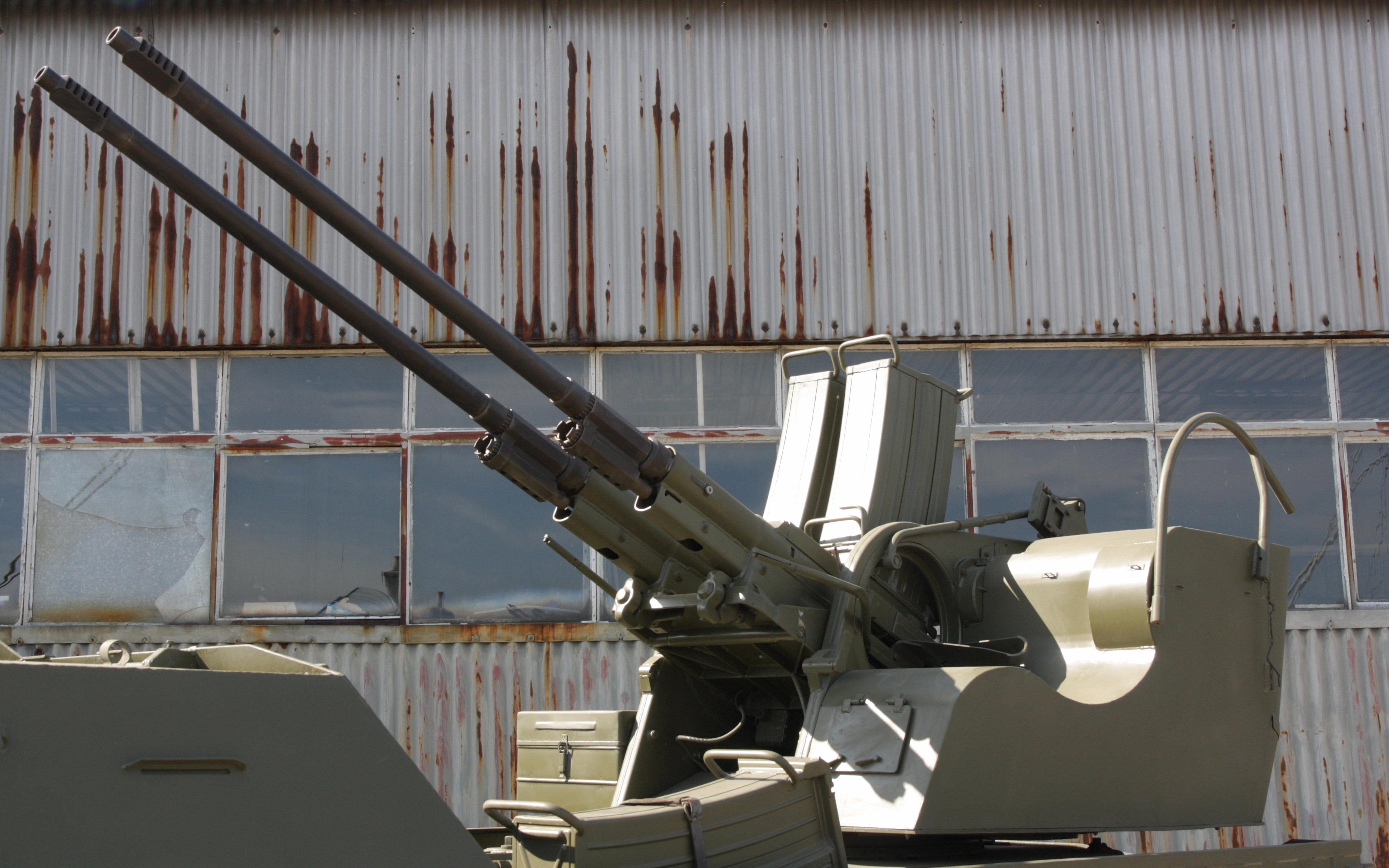 Samohybný protiletadlový dvojkanón vz. 53/59 v Technickém muzeu Brno.